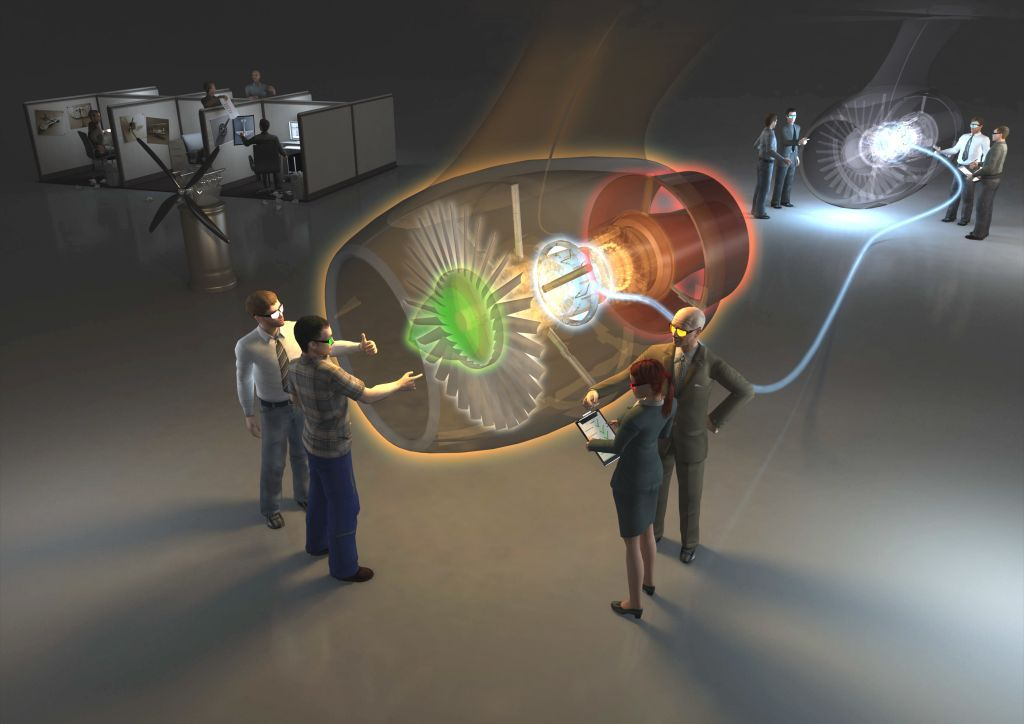 Virtual Reality macht komplexe Produkte begreifbar